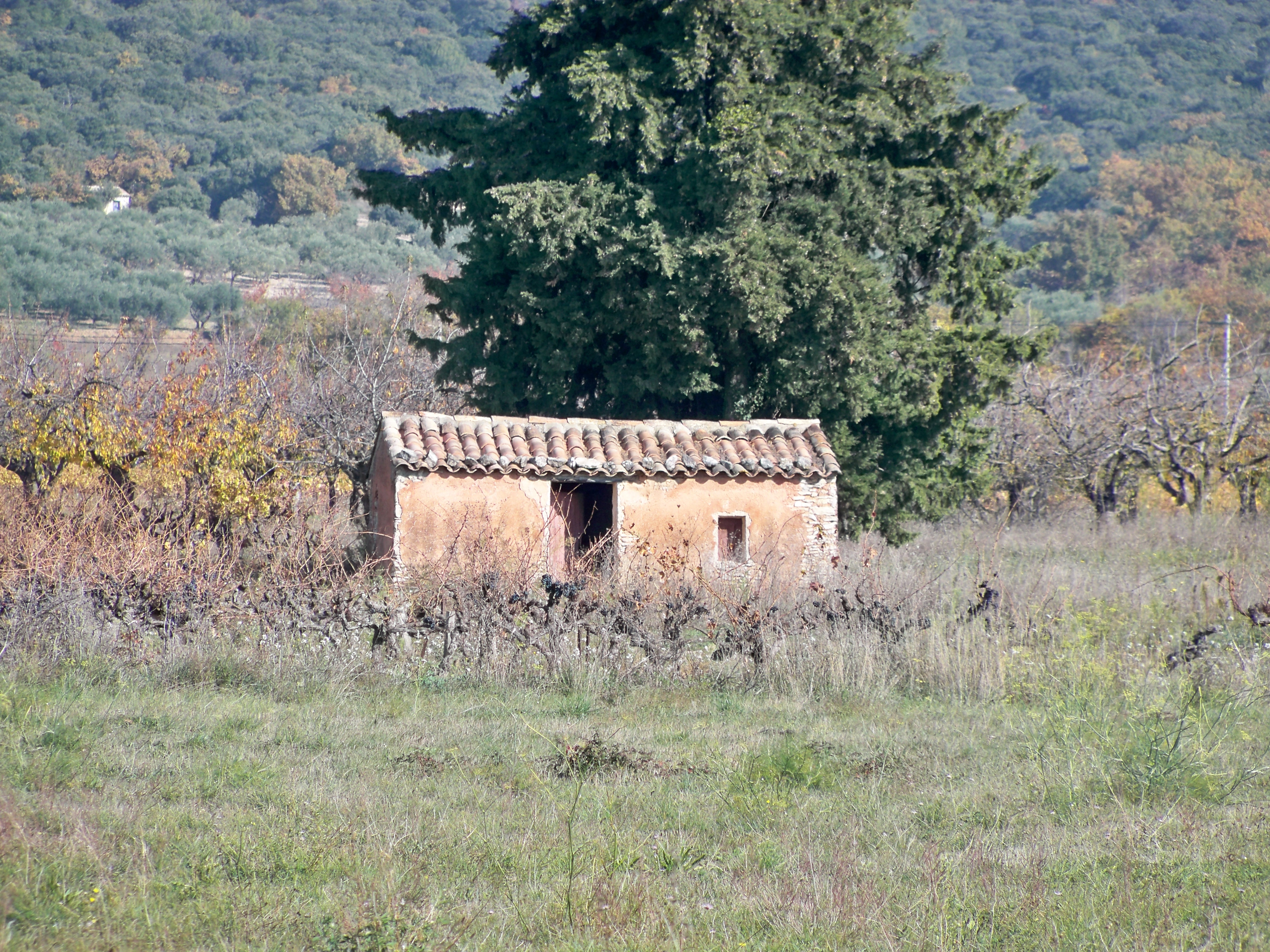 cabanon près de Villars (Vaucluse, France), hameau du Grand Clément